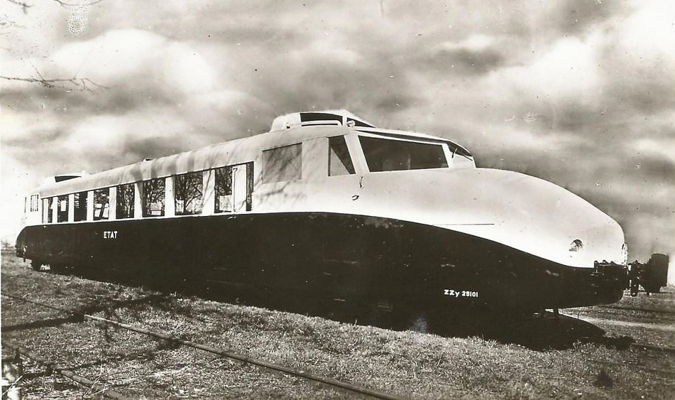 Autorail Decauville État ZZy 25101 et 25102 de 1937, ensuite renommés ZZ DC 1101 et 1102.